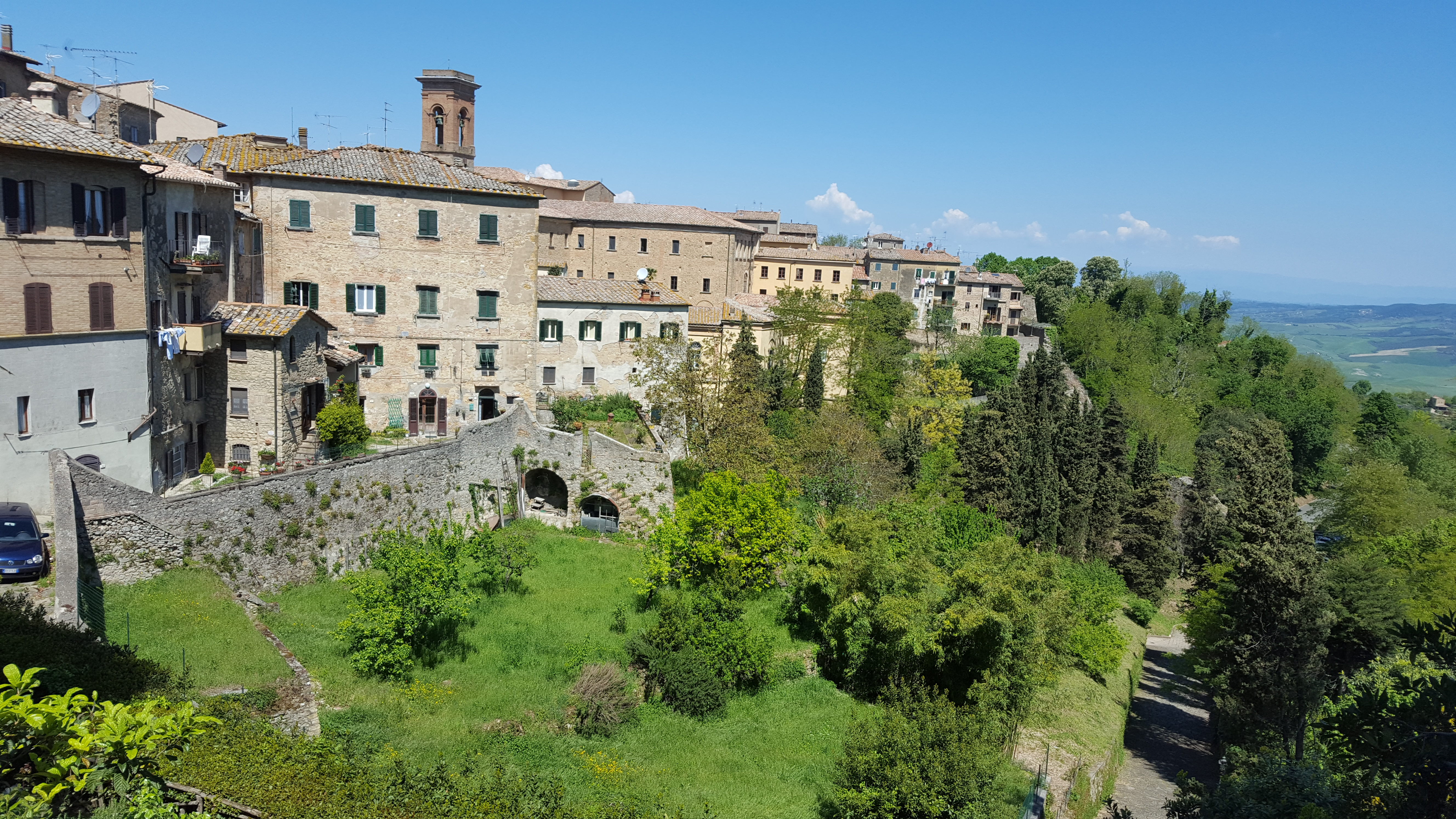 Volterra, Italy.